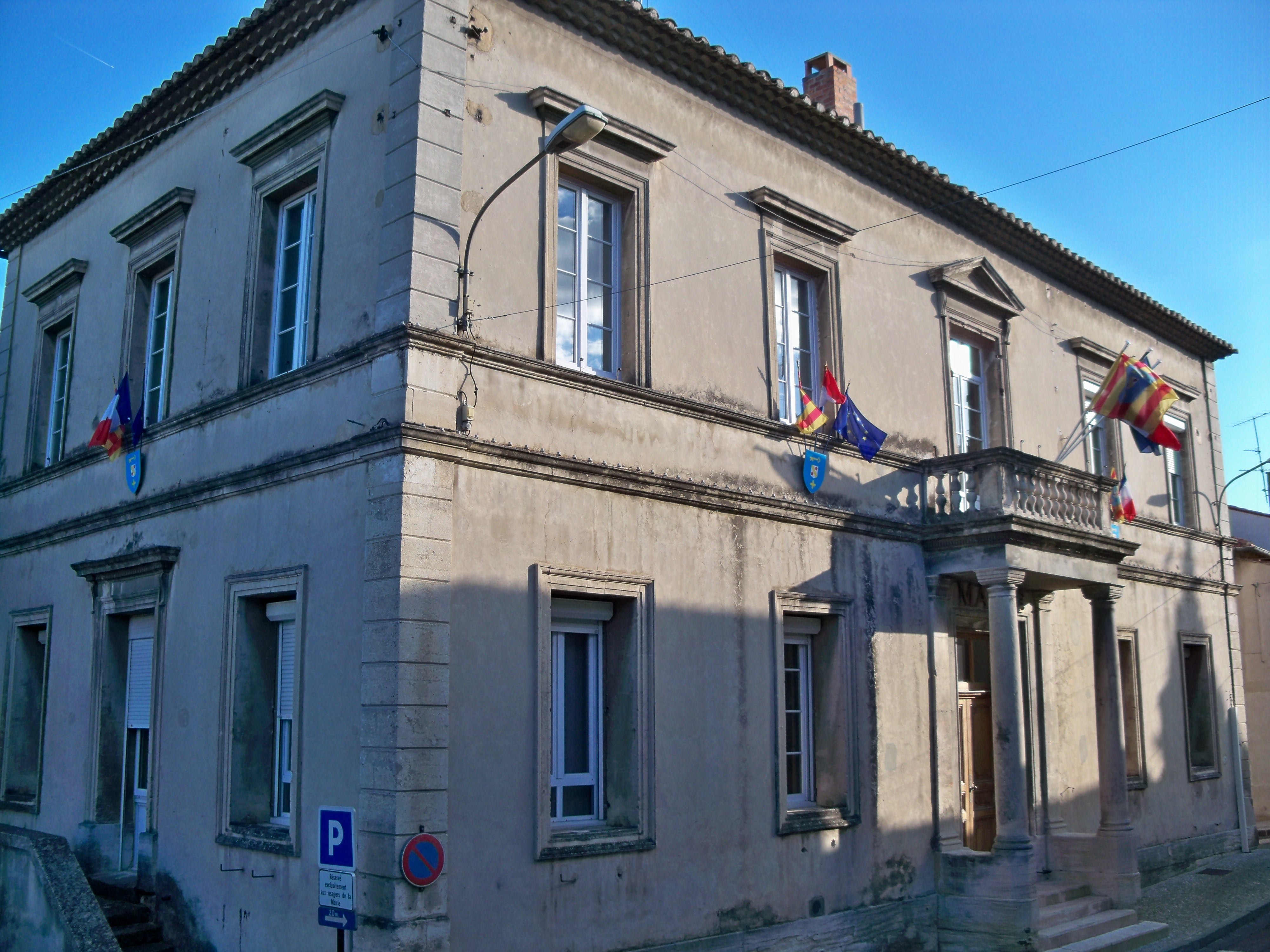 Ancienne facade de la Mairie de Vedène, Vaucluse, France